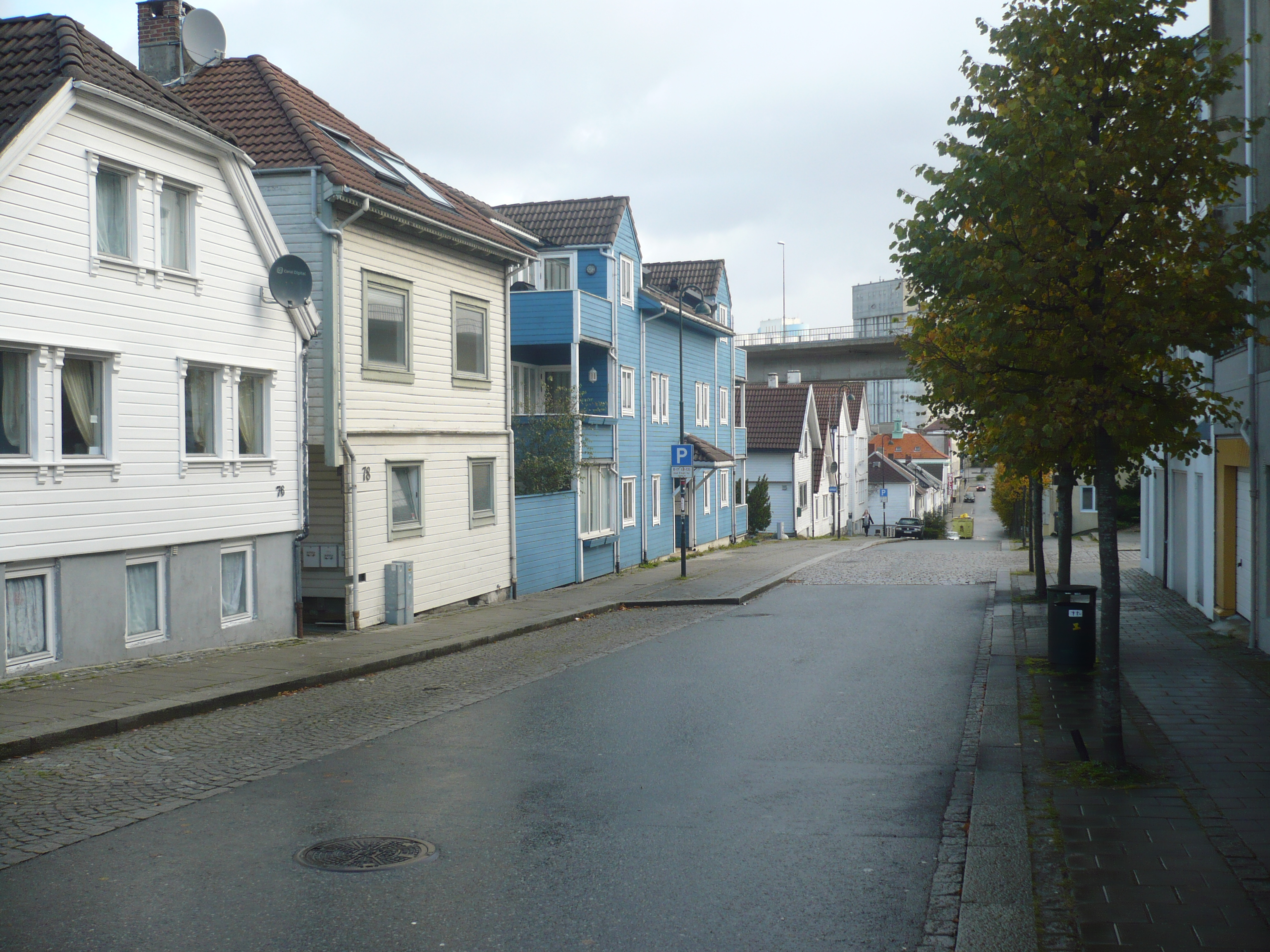 Gatebilde fra Pedersgata 76 til 84 i Stavanger.